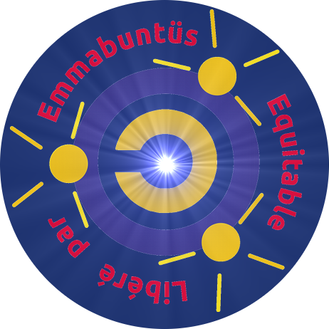 Étiquette du collectif Emmabuntüs utilisée pour la version 3